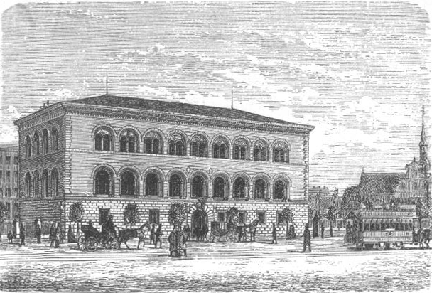 Nationalbanken. Opført 1866-71 af Herholdt i florentinsk Renæssancestil.